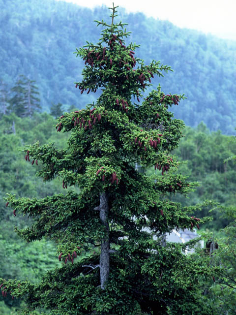 Picea jezoensis en Tokachi-dake onsen, Hokkaido. Foto por usario Inti-sol, julio 2006. エゾマツ、2006年7月、北海道十勝岳温泉で投稿者自身が撮影。